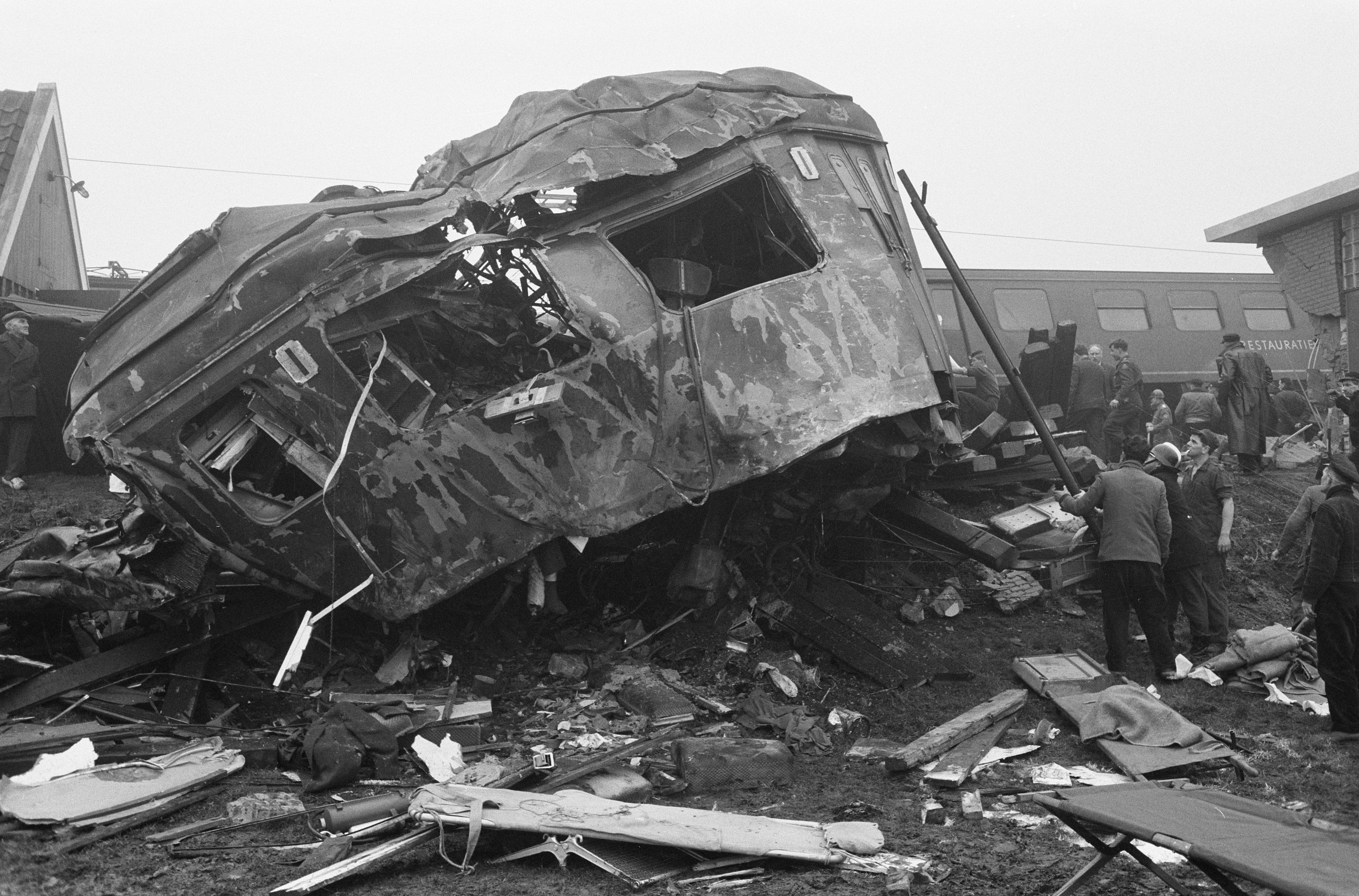 Collectie / Archief : Fotocollectie Anefo Reportage / Serie : Treinramp bij Harmelen. Overzicht van de ravage. Negentig doden Beschrijving : Overzicht van de ravage Annotatie : Door een menselijke fout botsten bij Harmelen de sneltrein Utrecht-Rotterdam tegen de stoptrein Rotterdam-Amsterdam. Er vielen 93 doden Datum : 8 januari 1962 Locatie : Harmelen, Utrecht (provincie) Trefwoorden : treinen, treinrampen Fotograaf : Fotograaf Onbekend / Anefo, [onbekend] Auteursrechthebbende : Nationaal Archief Materiaalsoort : Negatief (zwart/wit) Nummer archiefinventaris : bekijk toegang 2.24.01.05 Bestanddeelnummer : 913-3801